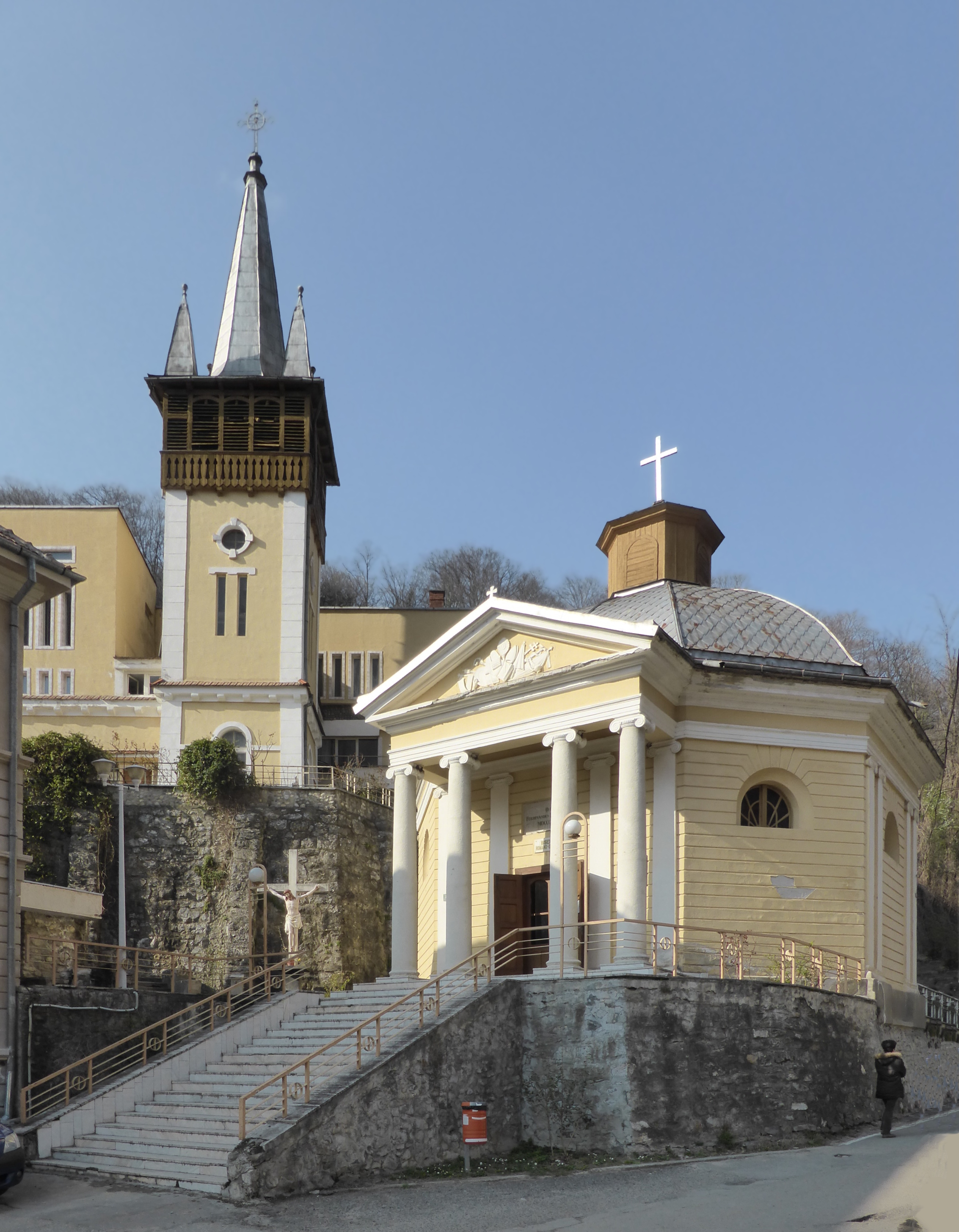 Die römisch-katholische Marienkirche in Herkulesbad (RO).